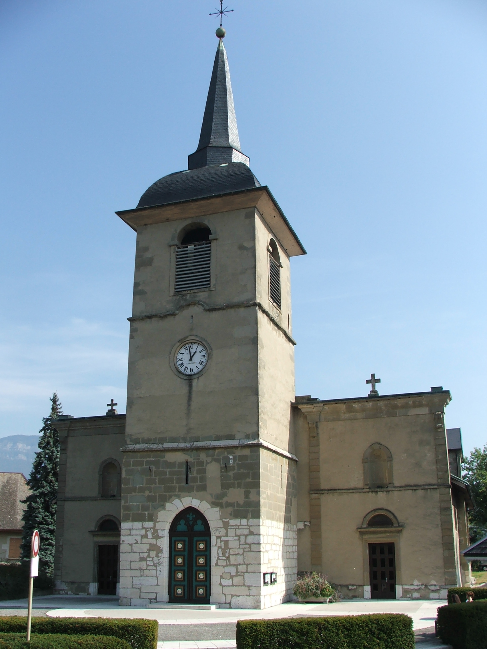 Église du second quart du XIXéme siècle This building is en partie classé, en partie inscrit au titre des Monuments Historiques. .